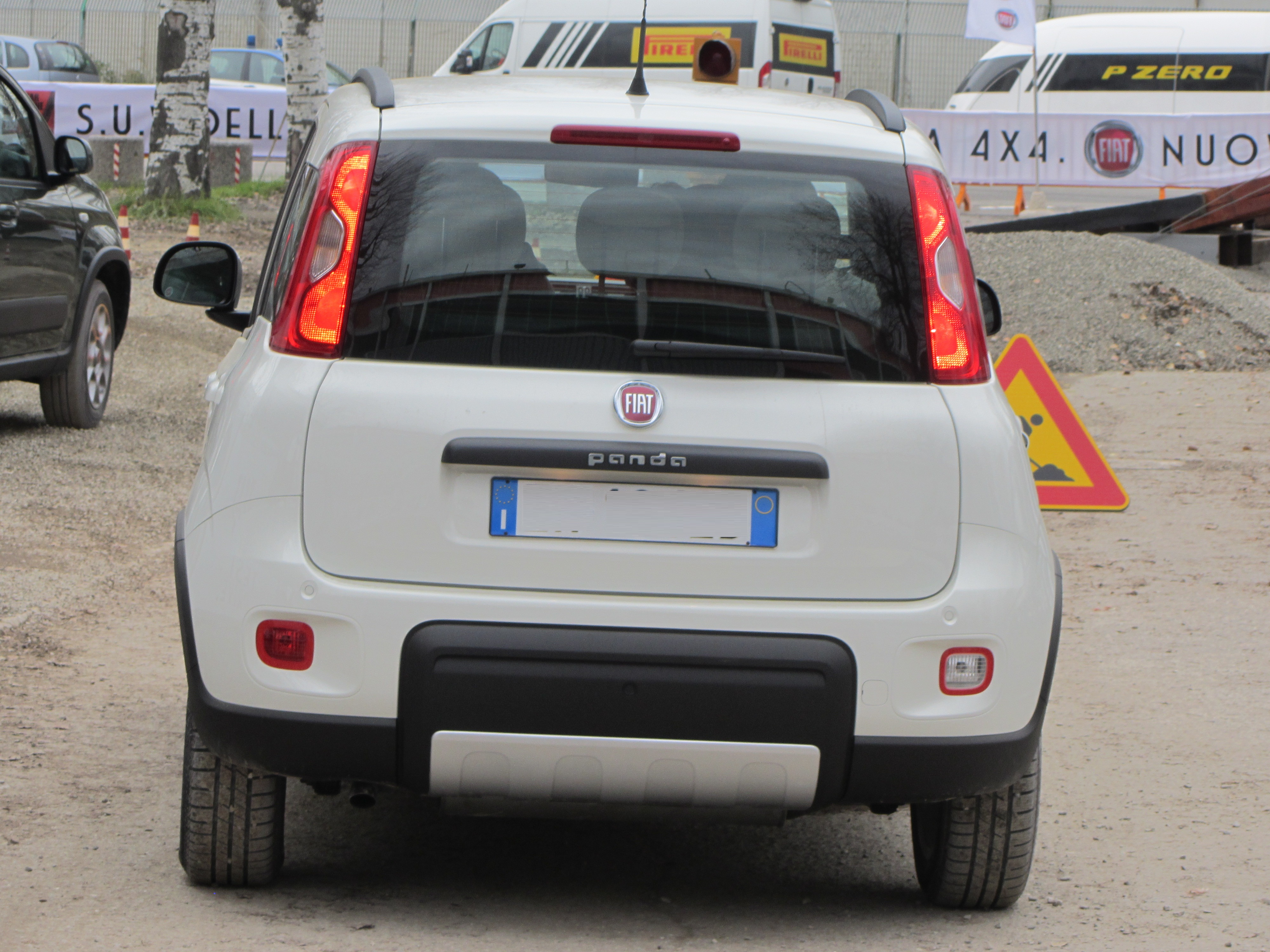 Test drive fuoristrada allo stand Fiat con la Nuova Panda 4x4 durante il Motorshow 2012 di Bologna